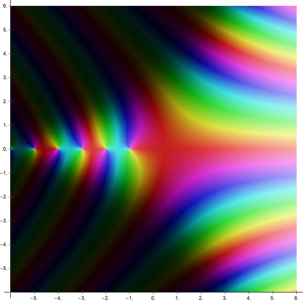 f ( z ) = z ! {\displaystyle f(z)=z!} 的圖形，實部與虛部範圍皆在-6到6之間。